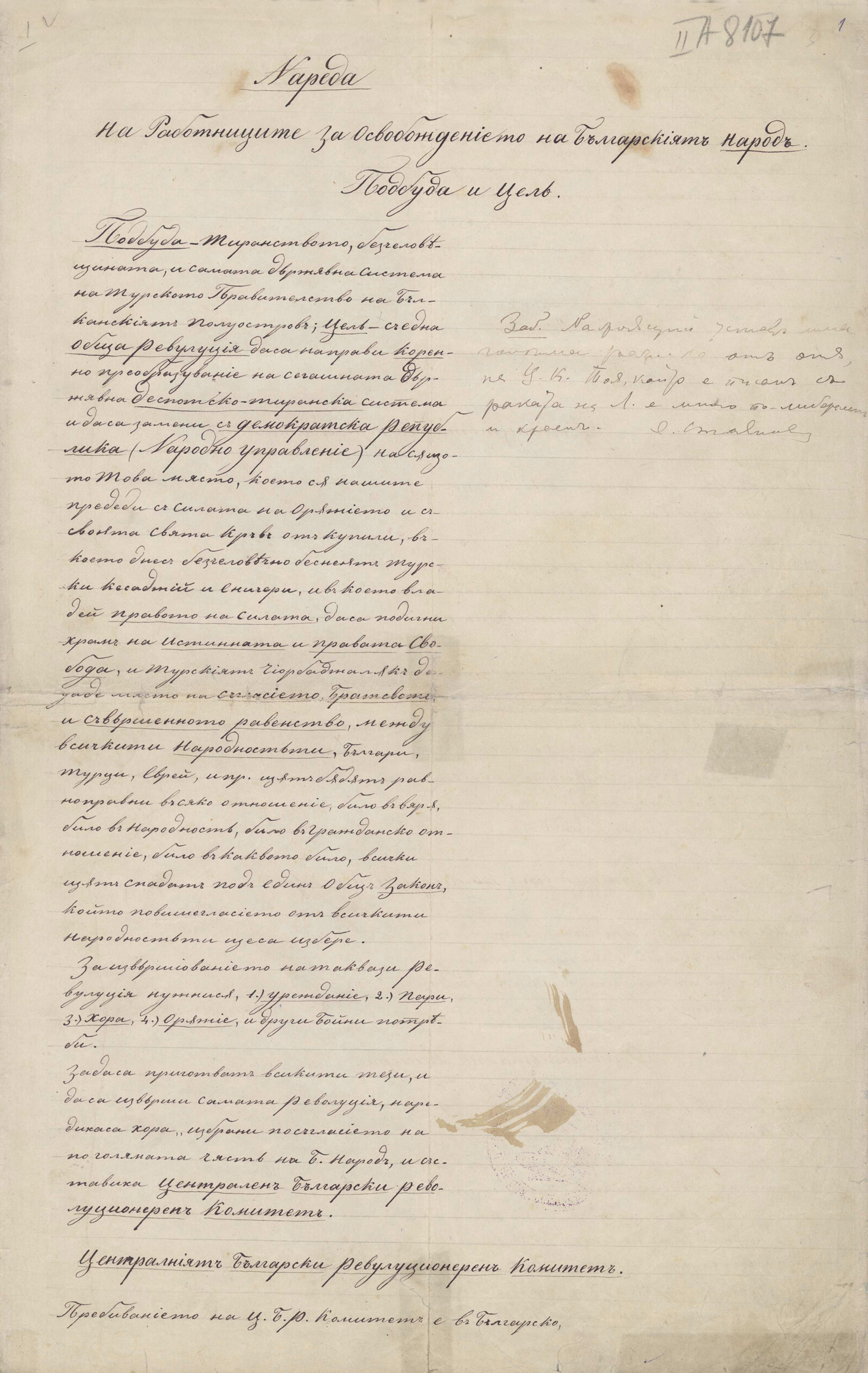 Проект за програма и устав на БРЦК в България, изготвен от Васил Левски през септември 1871. В програмната част се определя целта на революцията: ликвидиране на тиранско-деспотската султанска монархия; създаване на демократическа република. В организационната част са определени структурите и задачите на БРЦК.; Проект за програма и устав; Васил Левски. Документи. С., 2000 г.